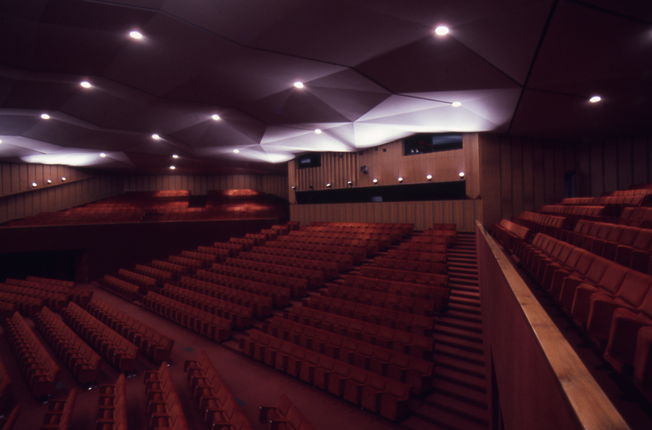 Bologna. Quartiere fieristico. Palazzo della Cultura e dei Congressi: interni. E.P.T. Servizio fotografico : Bologna, 1976 / Paolo Monti. - Foglio: 1, Fotogrammi complessivi: 17/20 : Diapositiva, sviluppo cromogeno/ pellicola ; 35 mm. - ((Sullo chassis della diapositiva n. 04 iscrizione manoscritta "Bo/ Pal. Cong.". - Le diapositive nn. 01-03 costituiscono un'altra serie. - Palazzo costruito nel 1975. - Occasione: Documentazione per la pubblicazione: Renzi Renzo, "Storia dei luoghi della città di Bologna", Bologna, E.P.T., 1976. - Fonte: Rubrica di Paolo Monti: Diapositive 24x36mm (1948-1982), presso Archivio Paolo Monti. Rubrica con elenco soggetti e numeri di inventario (da 1 a 1000) corrispondenti ai fogli a tasche in pvc in cui sono contenute le diapositive. - Fonte: Monografia di Renzi, Renzo: Storia dei luoghi della città di Bologna, Bologna, E.P.T. (1976). - Fonte: Agenda di Paolo Monti: Monti - Agenda 1976 (1976/00/00), presso Archivio Paolo Monti